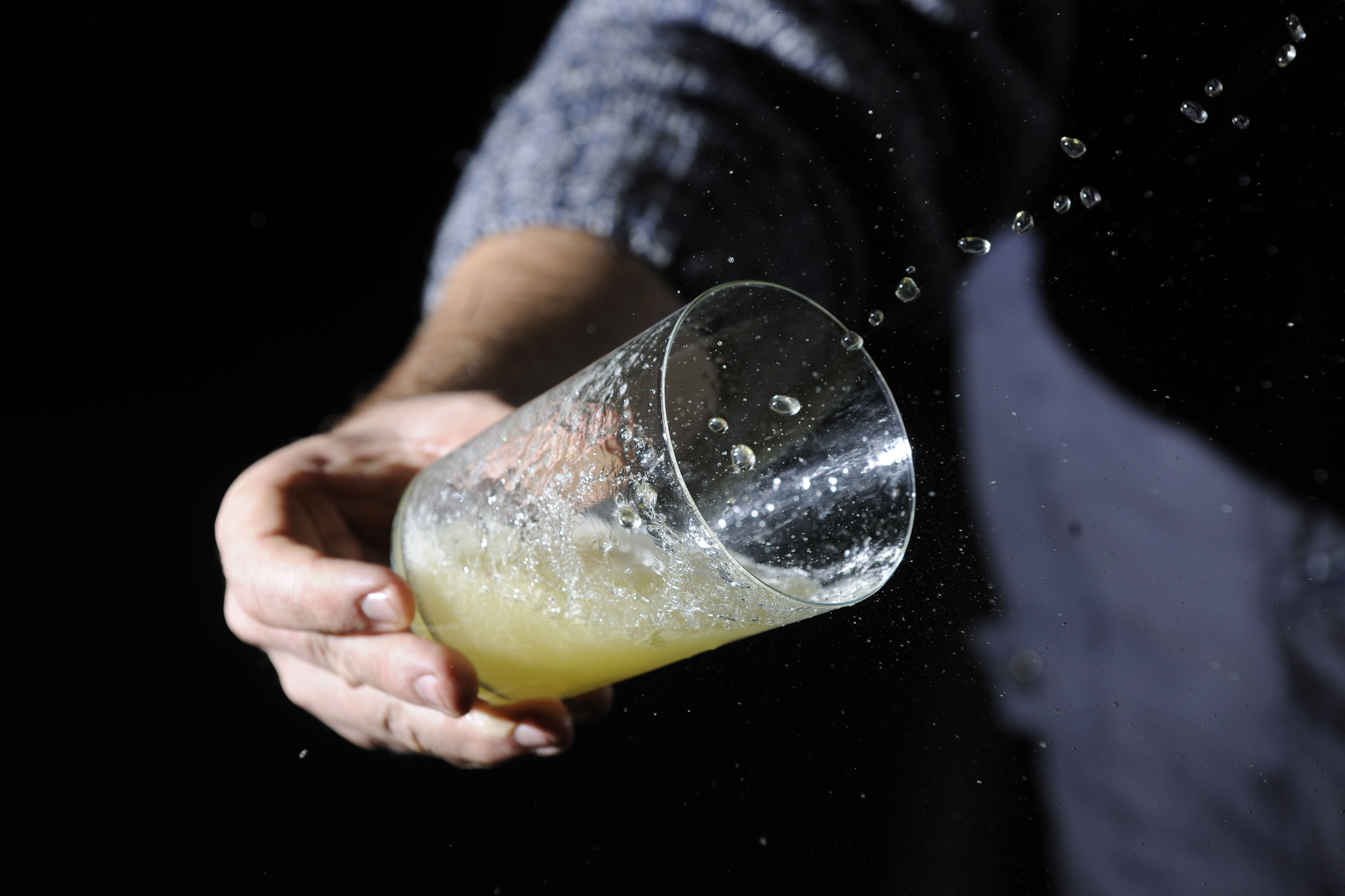 Sidreria "Irigoien Herrero" de Astigarraga